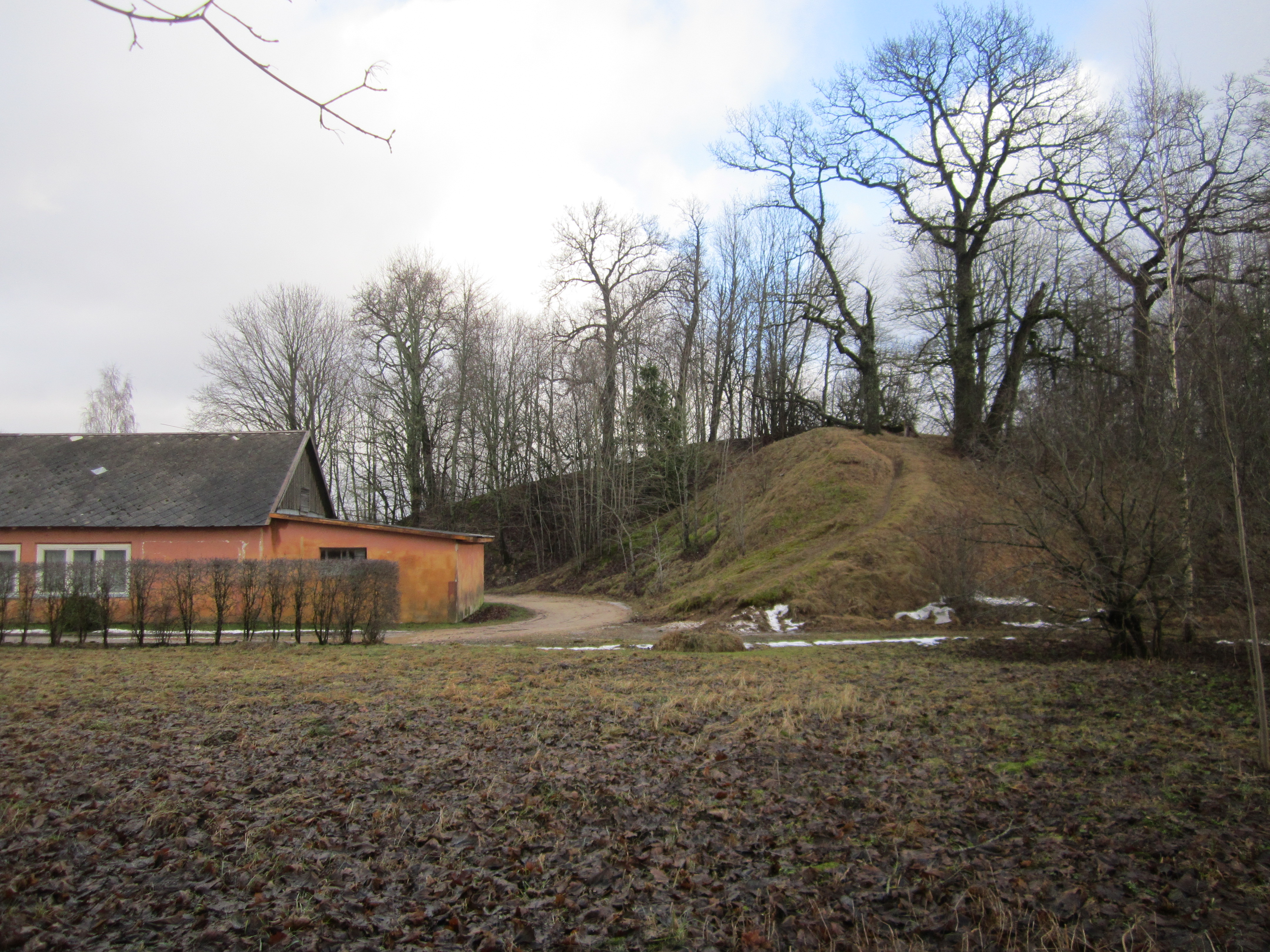 Annas ( Baznīcas) kalns Juglas ciemā. Attēla autors A.Kuzmins